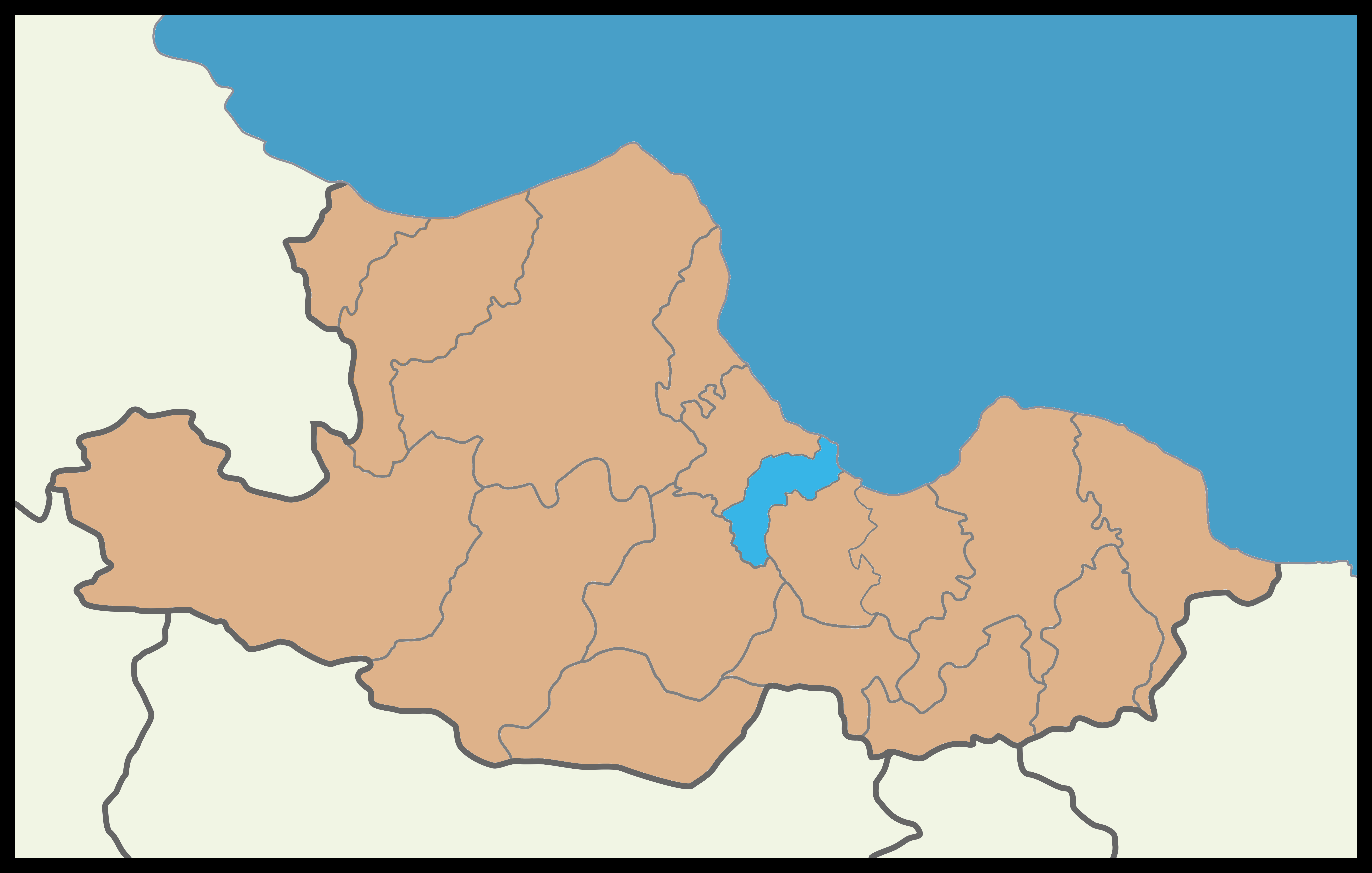 Samsun'un İlkadım ilçesinin 2019 Türkiye yerel seçimleri haritası.